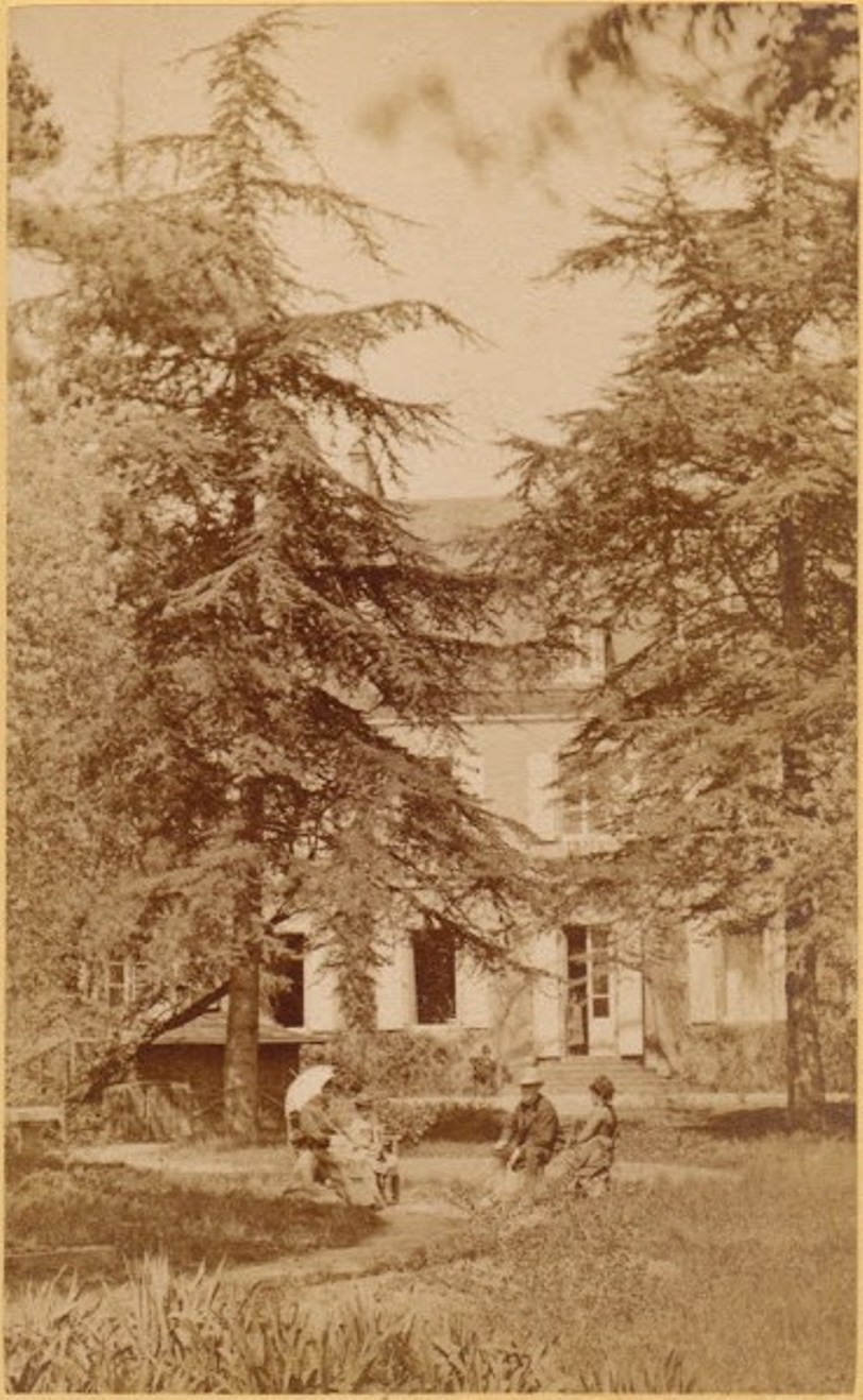 Placide Verdot, photographe au n° 54 rue Grande à Châteauroux, dans le département de l'Indre. Il réalise une série de photographies sur le domaine de Nohant en 1875, à la demande de la romancière George Sand. George Sand est à gauche sous une ombrelle, entourée de ses deux petites-filles, Aurore et Gabrielle, et à droite son fils Maurice Dudevant-Sand avec son épouse Lina Calamatta, le 26 avril 1875.